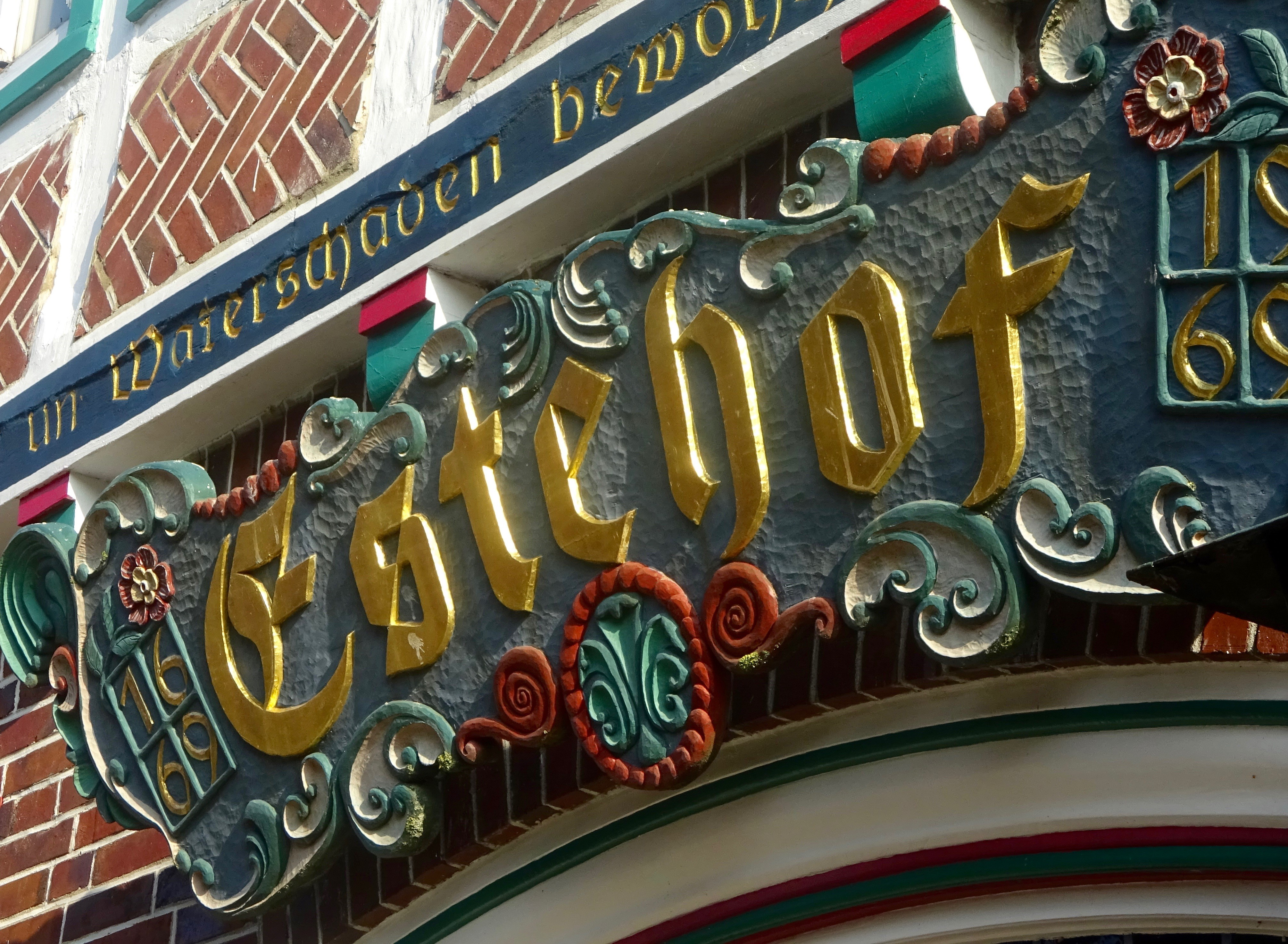 Detail der Hausfront des Estehofes in Estebrügge